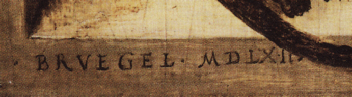 Signatur und Datierung aus Pieter Bruegels Gemälde Zwei Affen (Staatliche Museen zu Berlin-Preußischer Kulturbesitz, Gemäldegalerie)